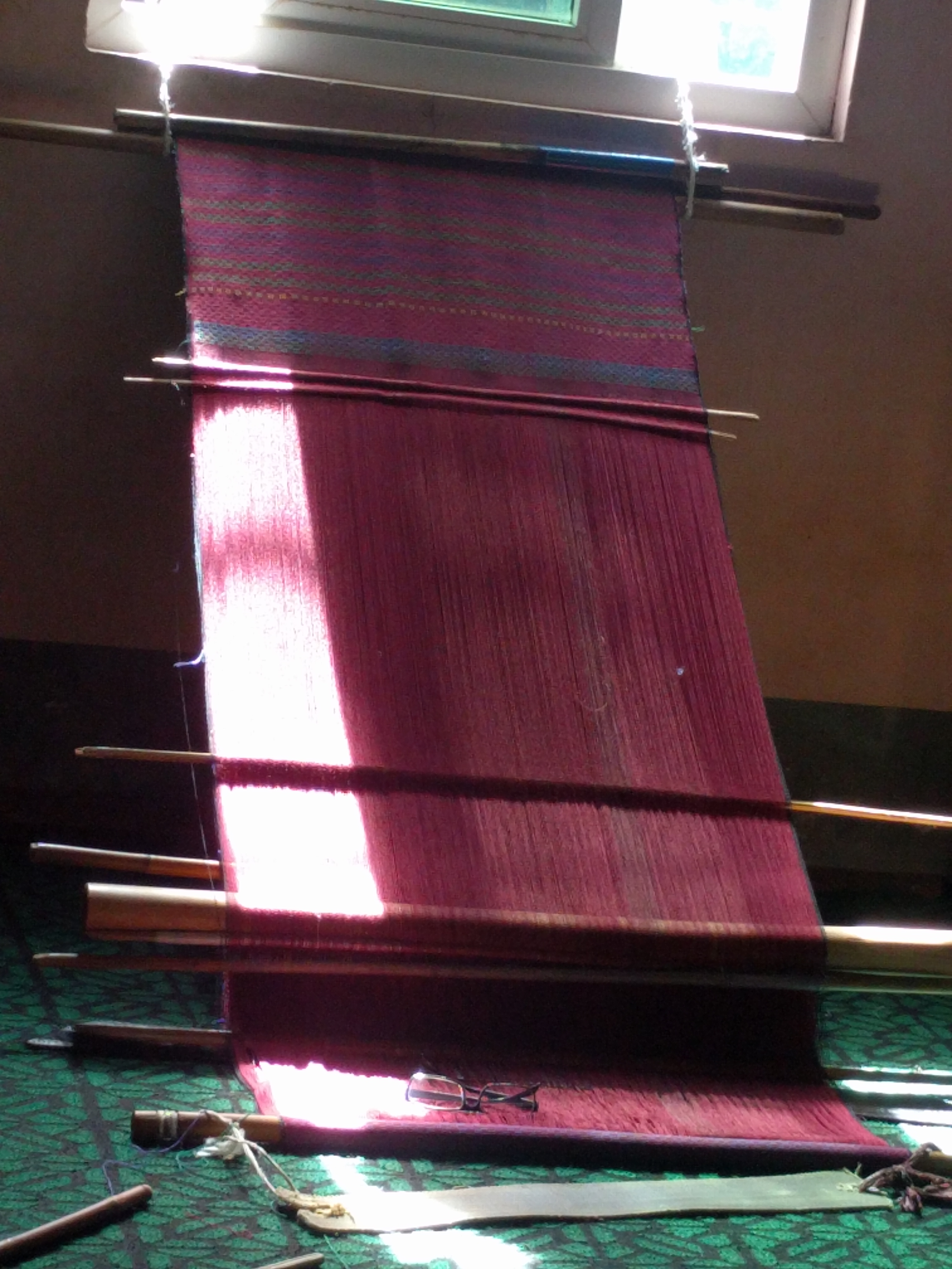 မြန်မာဘာသာ: မြန်မာ ရက်ကန်း